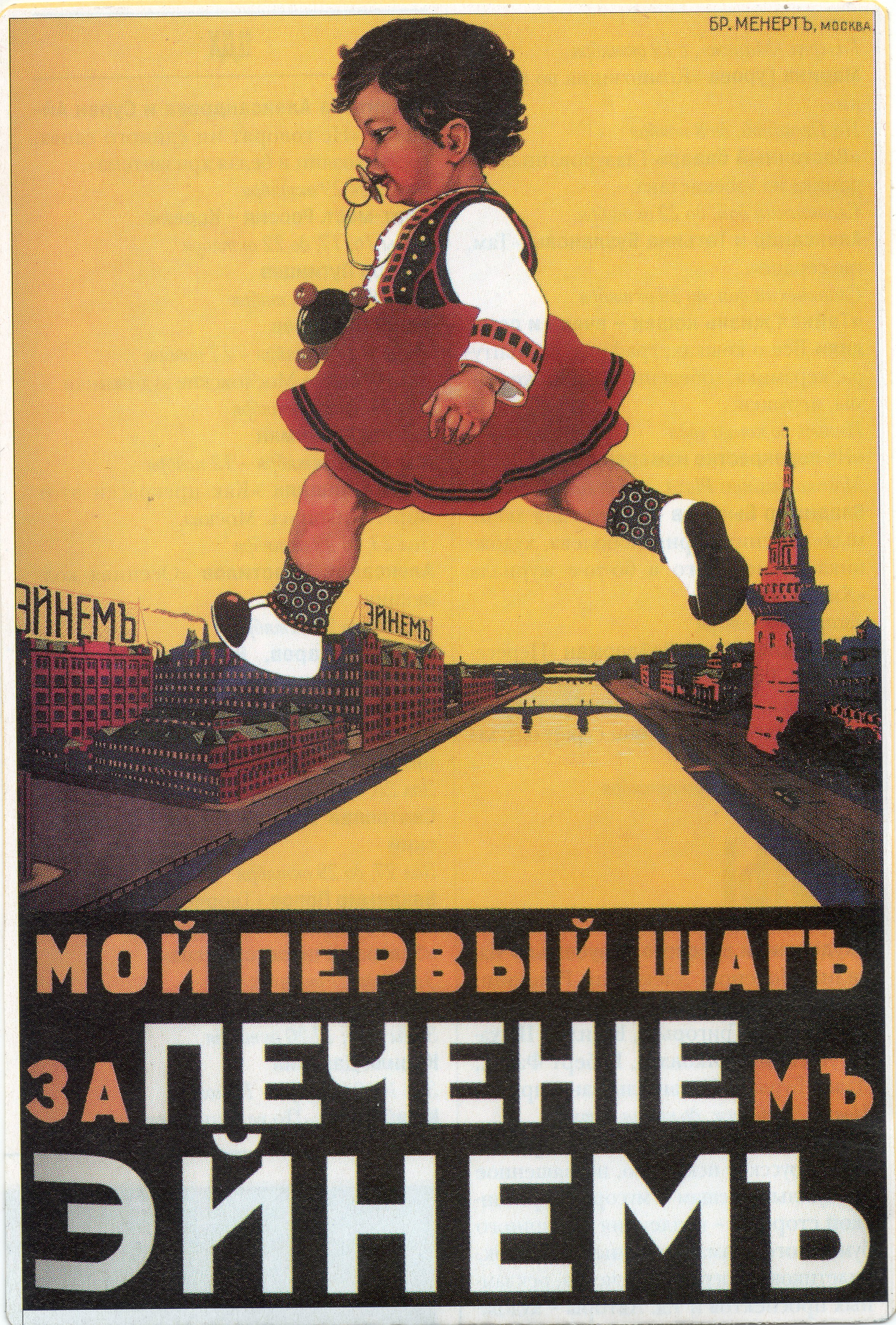 Товарищество "Эйнем". "Мой первый шаг за ПЕЧЕНИЕм ЭЙНЕМ" (от Кремля через Москва-реку на фабрику). Реклама. До 1914 года (ориентировочно 1904-1912). Вариант 1 - необрезанный, цвет неестественный. Вариант 2 - обрезан вертикально, цвет естественный (как в оригинале).